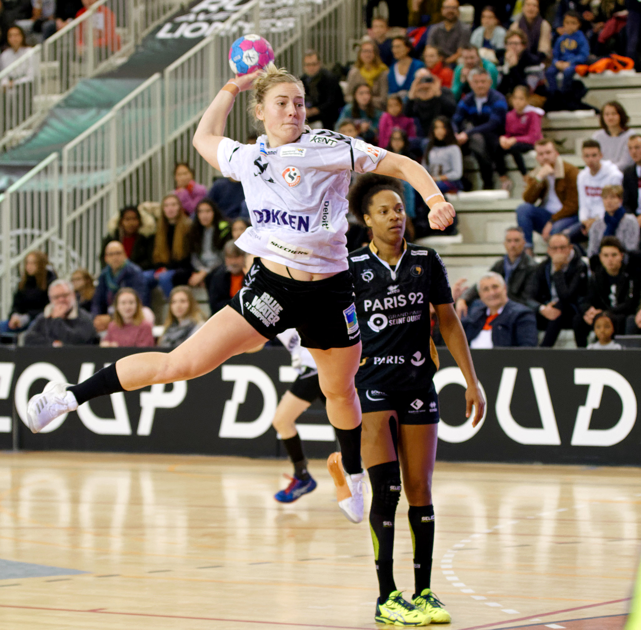 Lors de la rencontre du 3e tour de la Coupe EHF entre Paris 92 et les danoises de Team Esbjerg. A Issy les moulineaux, le 18 novembre 2018.